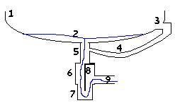 כיור